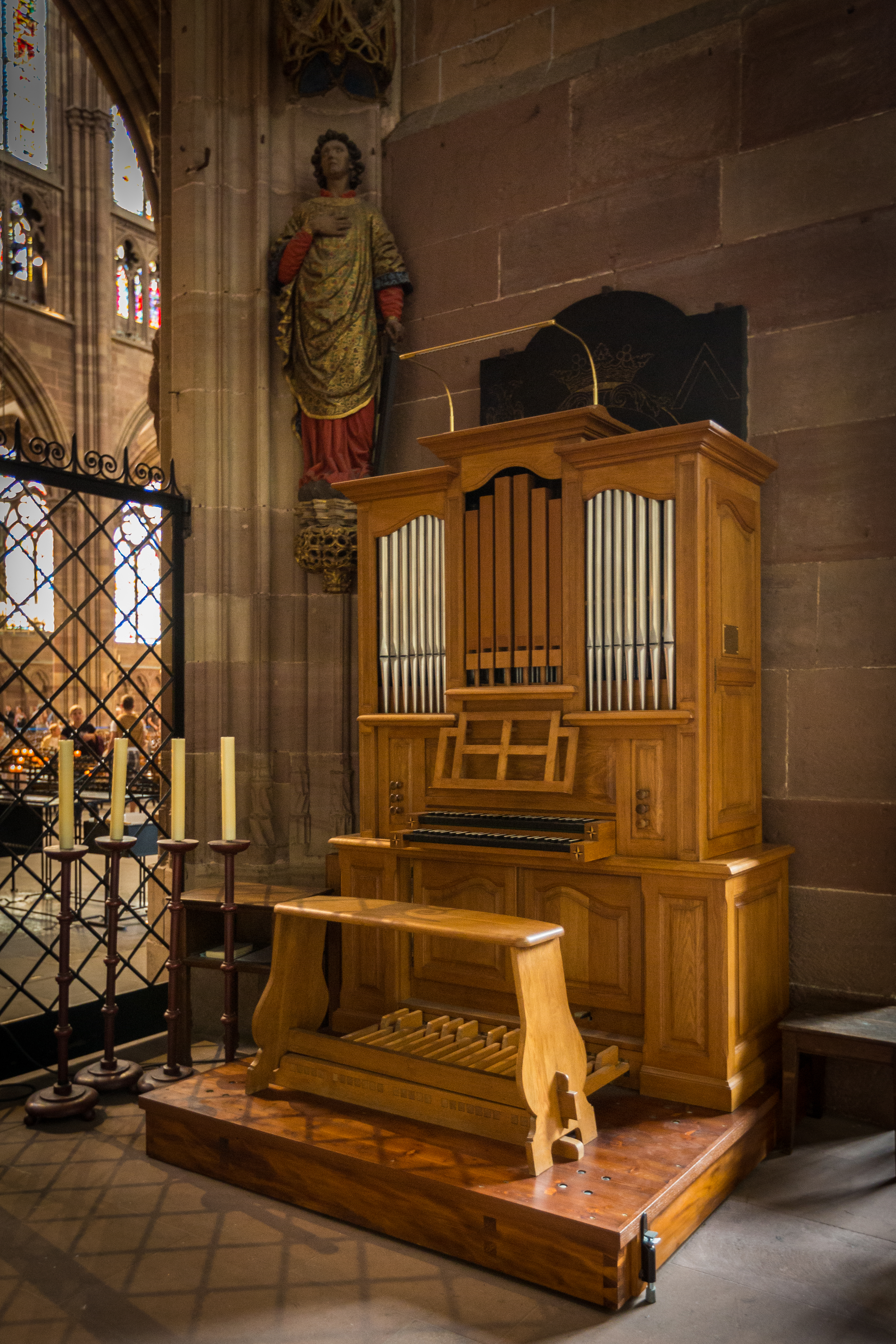 Cathédrale Notre-Dame de Strasbourg orgue chapelle Saint-Laurent